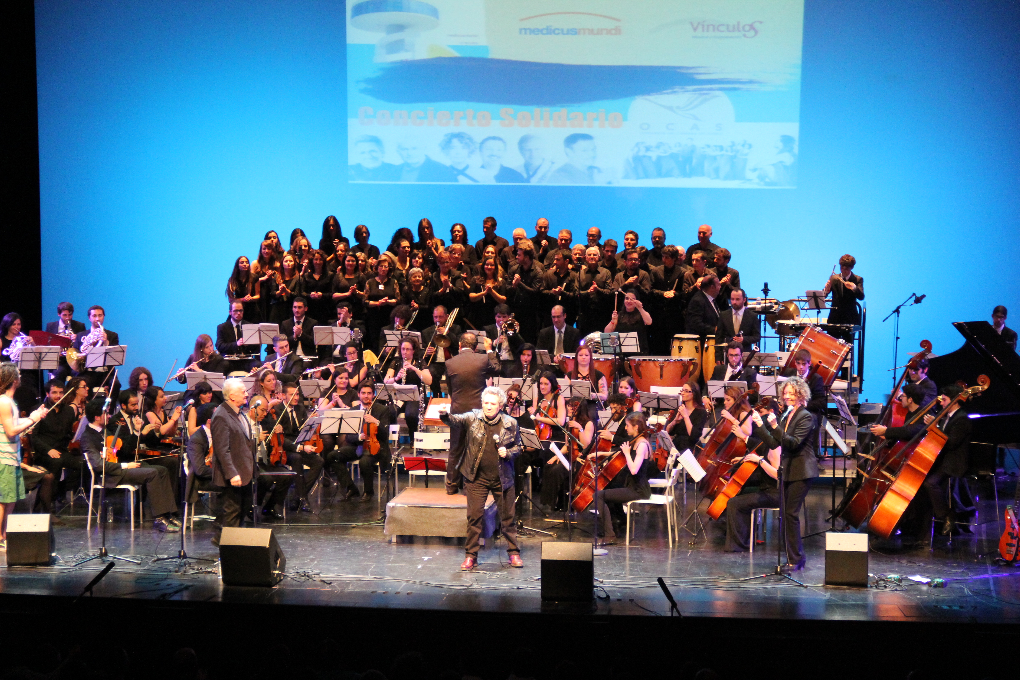 Foto de la Orquesta de Cámara de Siero durante la Gala benefica celebrada el 16 de Mayo 2015 junto con Victor Manuel, Miguel Ríos, Olga Román, Truequedart y Andreas Pittwitz